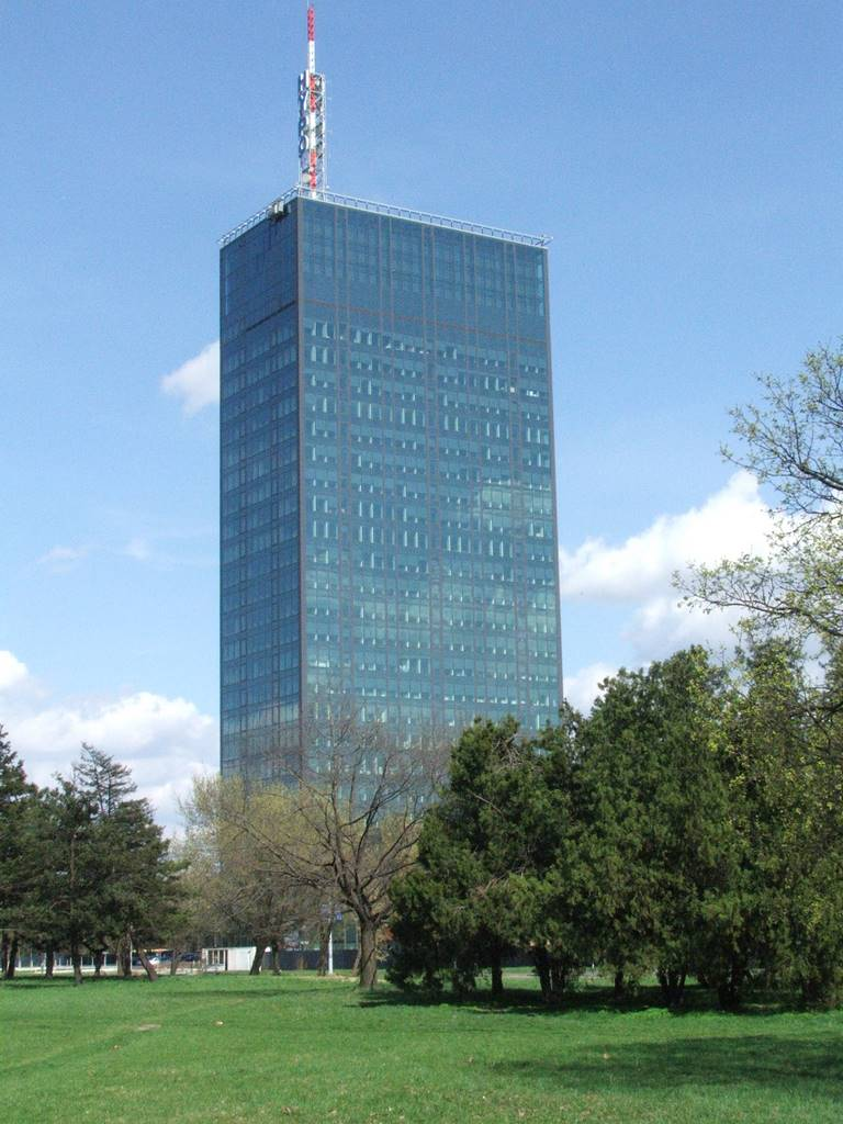 zgrada bivšeg CK u Novom Beogradu. fotografisala: Jelena Irić